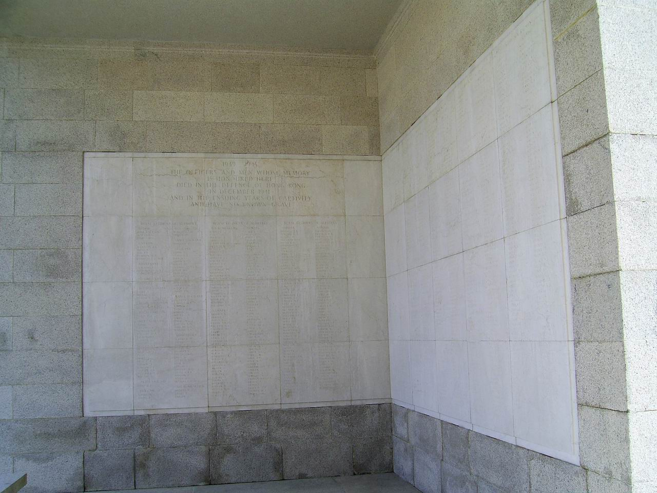 中文（香港）: 西灣國殤紀念墳場殉難者名字碑石